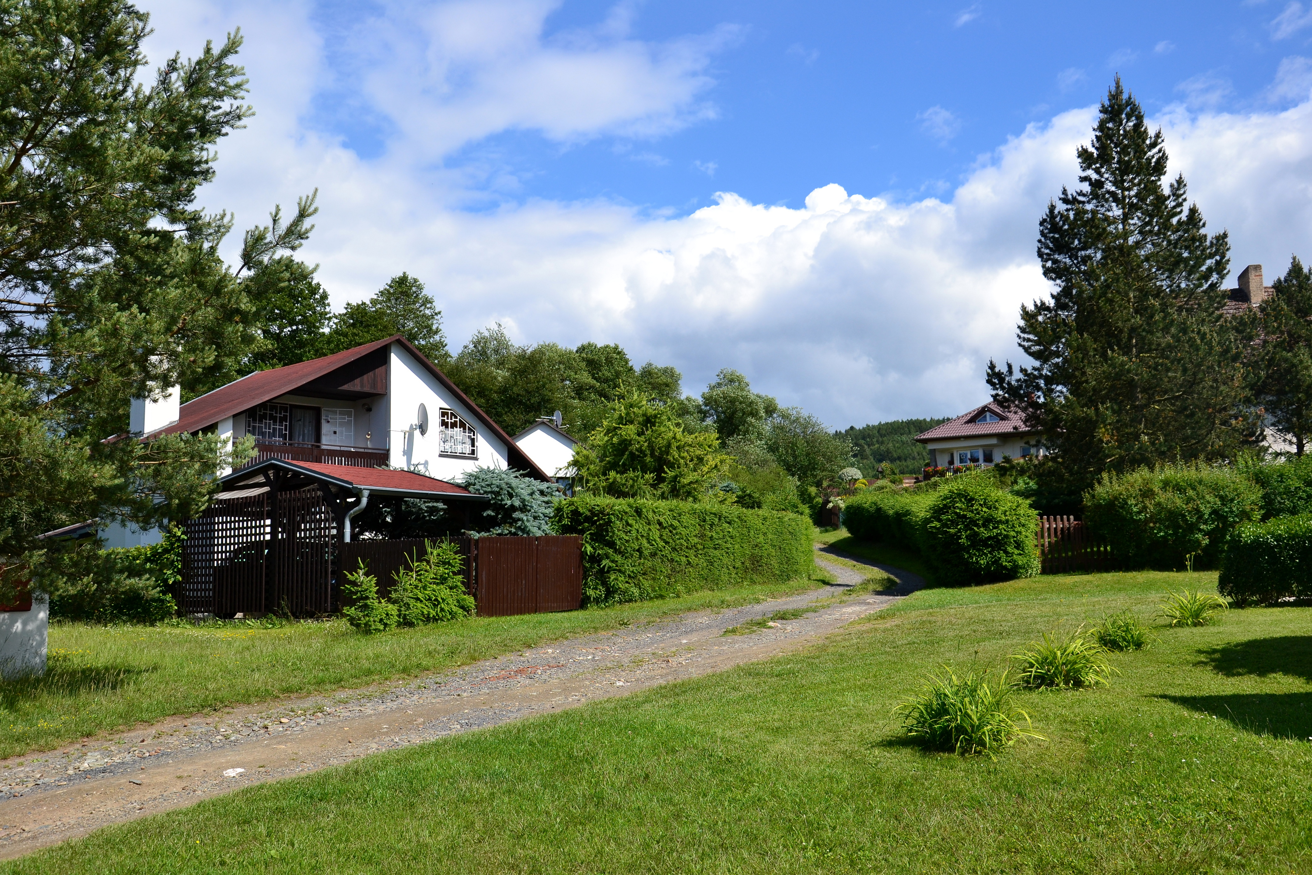 Náves v chatové osadě